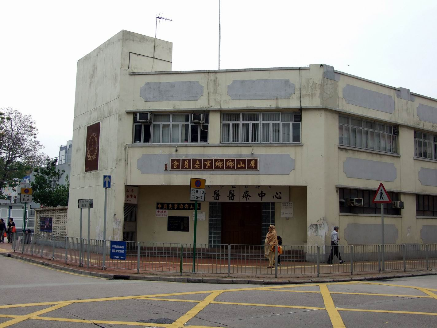 屏山鄉鄉事委員會